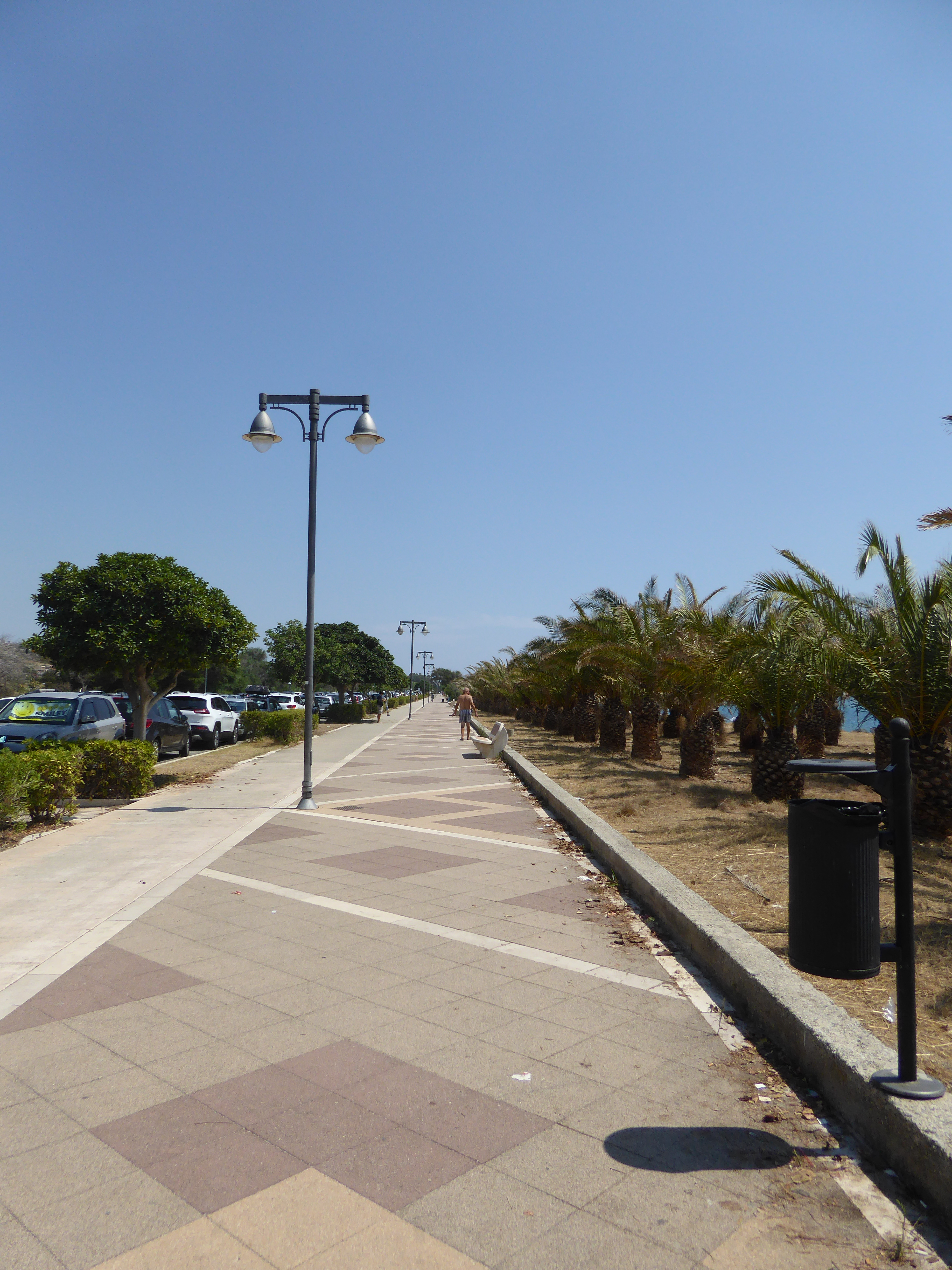 Lungomare di Roccella Jonica 2018